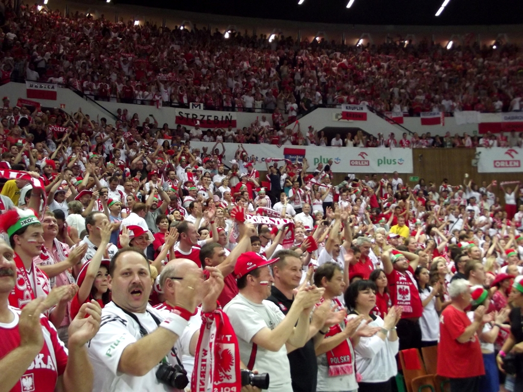 Zdjęcie zrobione podczas meczu Polska - USA siatkarskiej Ligii Światowej w katowickim Spodku.